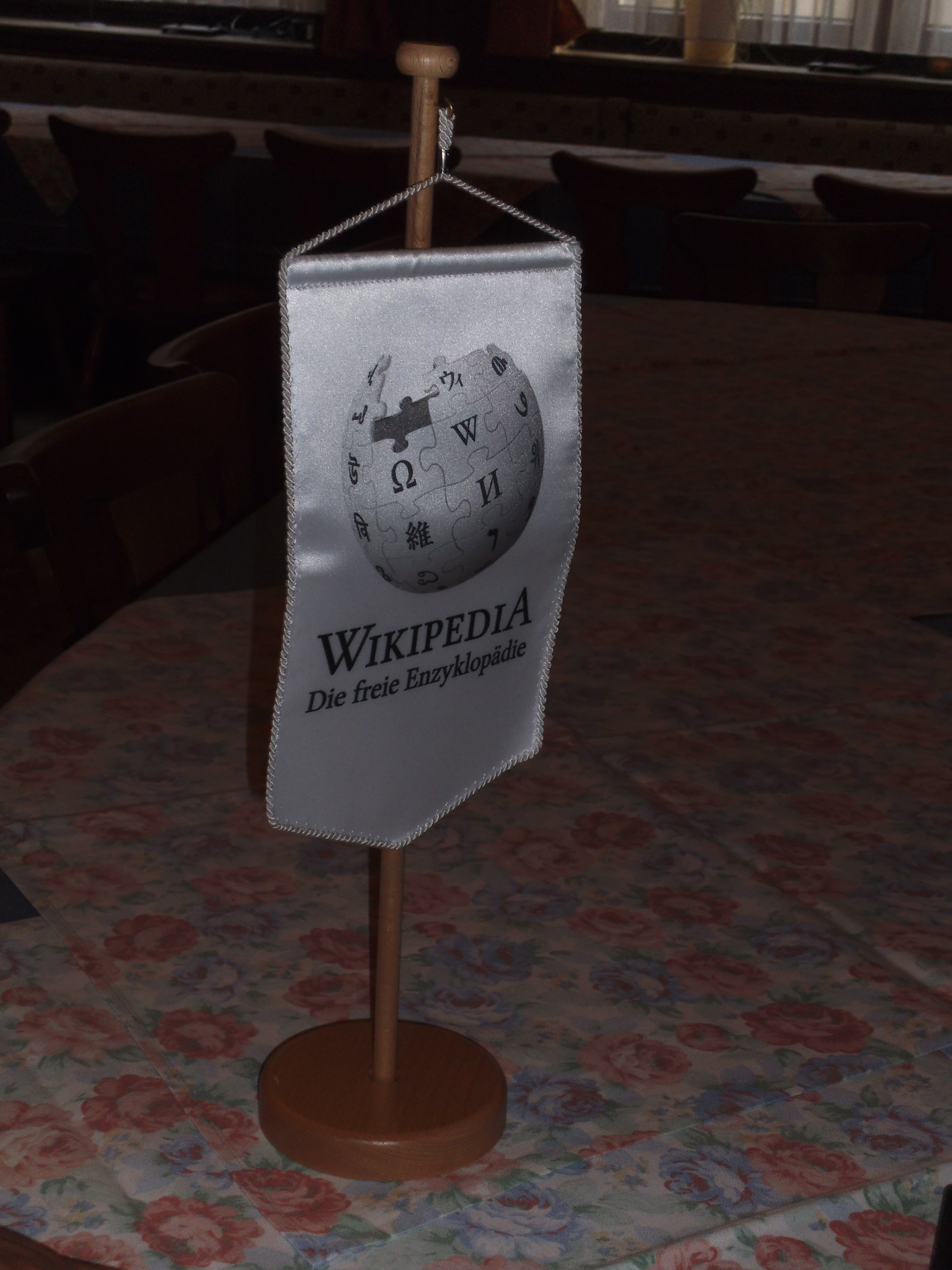 Wimpel direkt nach dem Aufstellen beim Stammtisch Duisburg in Duisburg-Meiderich am 16. August 2014